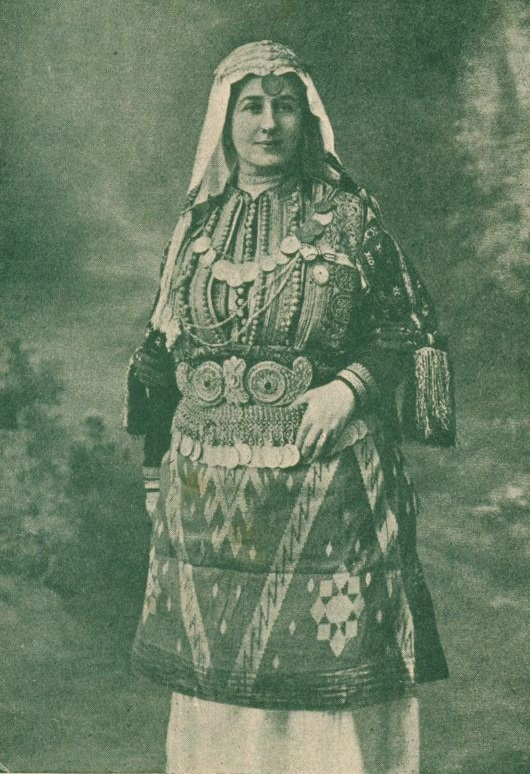 Димитър Станишев